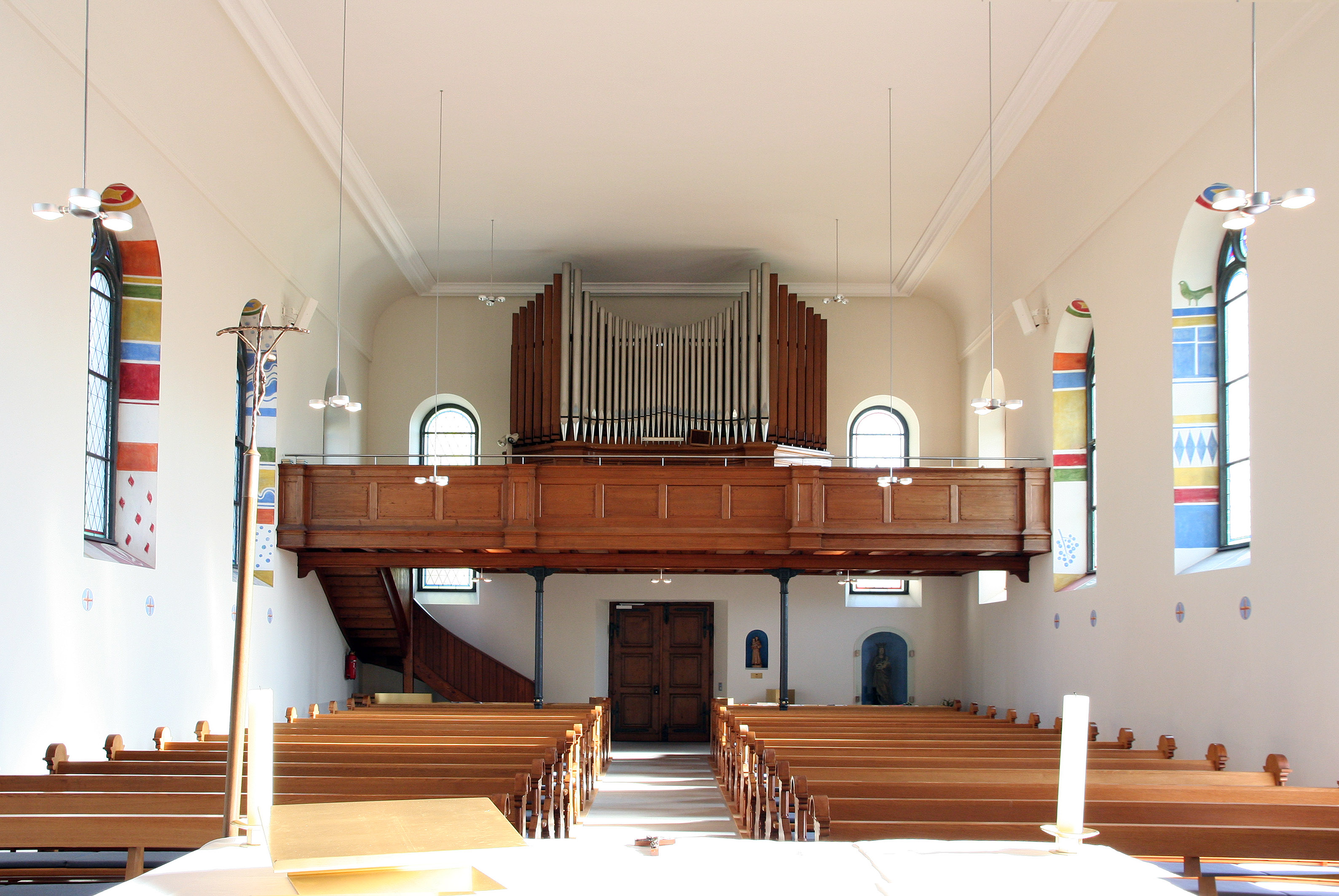 Römisch-katholische Pfarrkirche St. Pirminius Pfungen